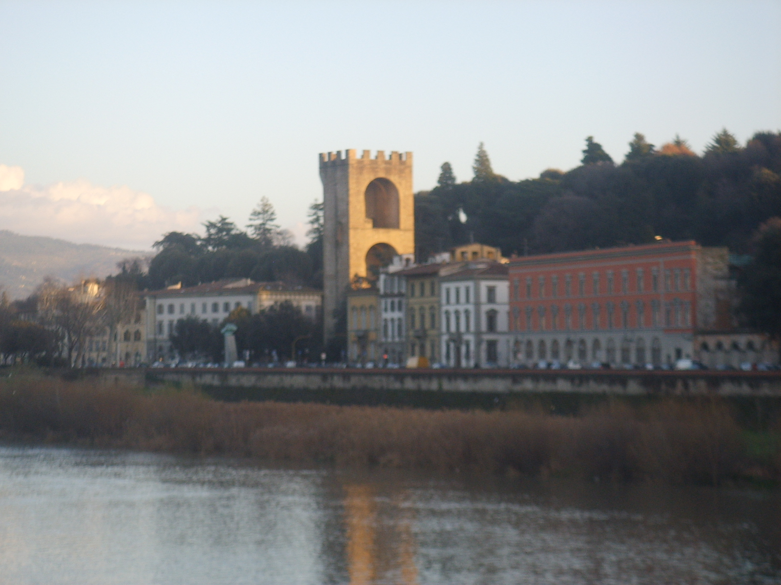 Lungarno_serristori_(porta_san_niccolò)